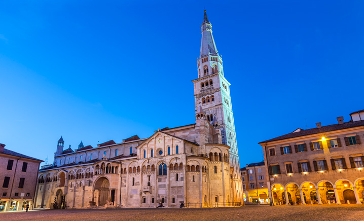 Modena piazza Motor Valley Fest